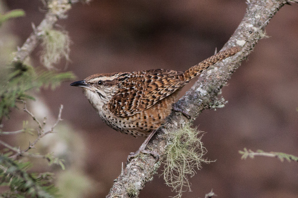 San Blas,Nayarit